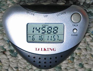 Konuşan Pedometre